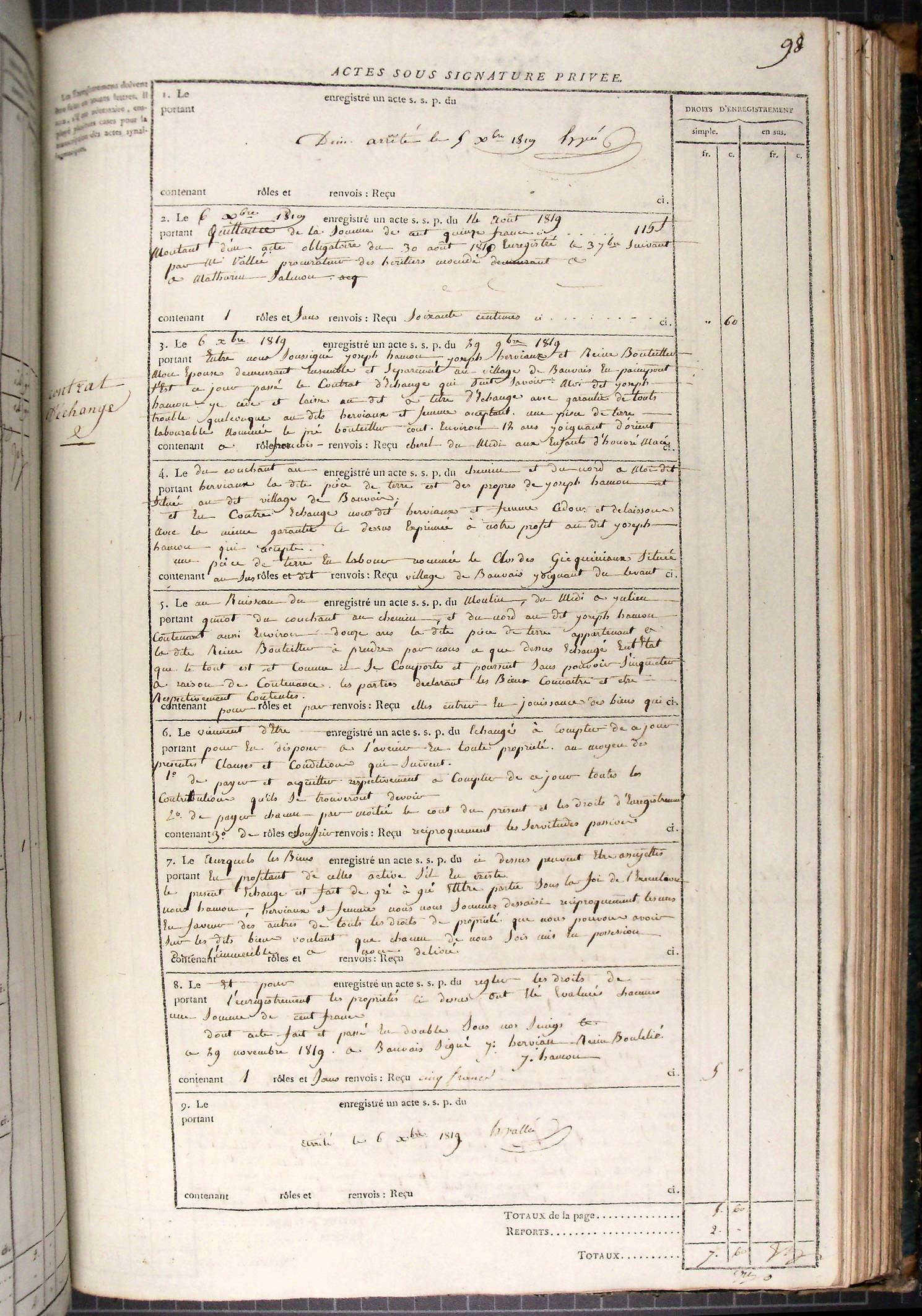 Page d'un registre de recettes des taxes sur les actes sous signature privée (Enregistrement) dans le bureau de Plélan-le-Grand, direction de Rennes, en Bretagne, France. Acte d'échange de deux terrains à Paimpont en 1819. Cote 3Q 27 239 des Archives départementales d'Ille-et-Vilaine.